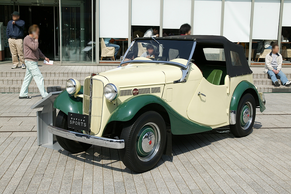 Datsun Sports DC3.